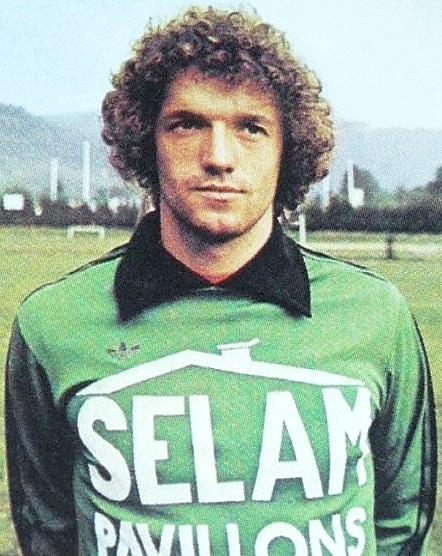 Albert Rust en 1978 (FC Sochaux), 'Football 1978 - 1979', Panini figurina.